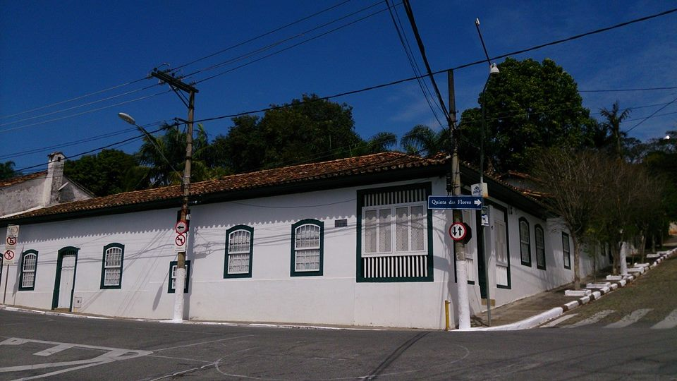 Rua Bartolomeu Bueno da Silva, Centro Histórico de Santana de Parnaíba/SP.